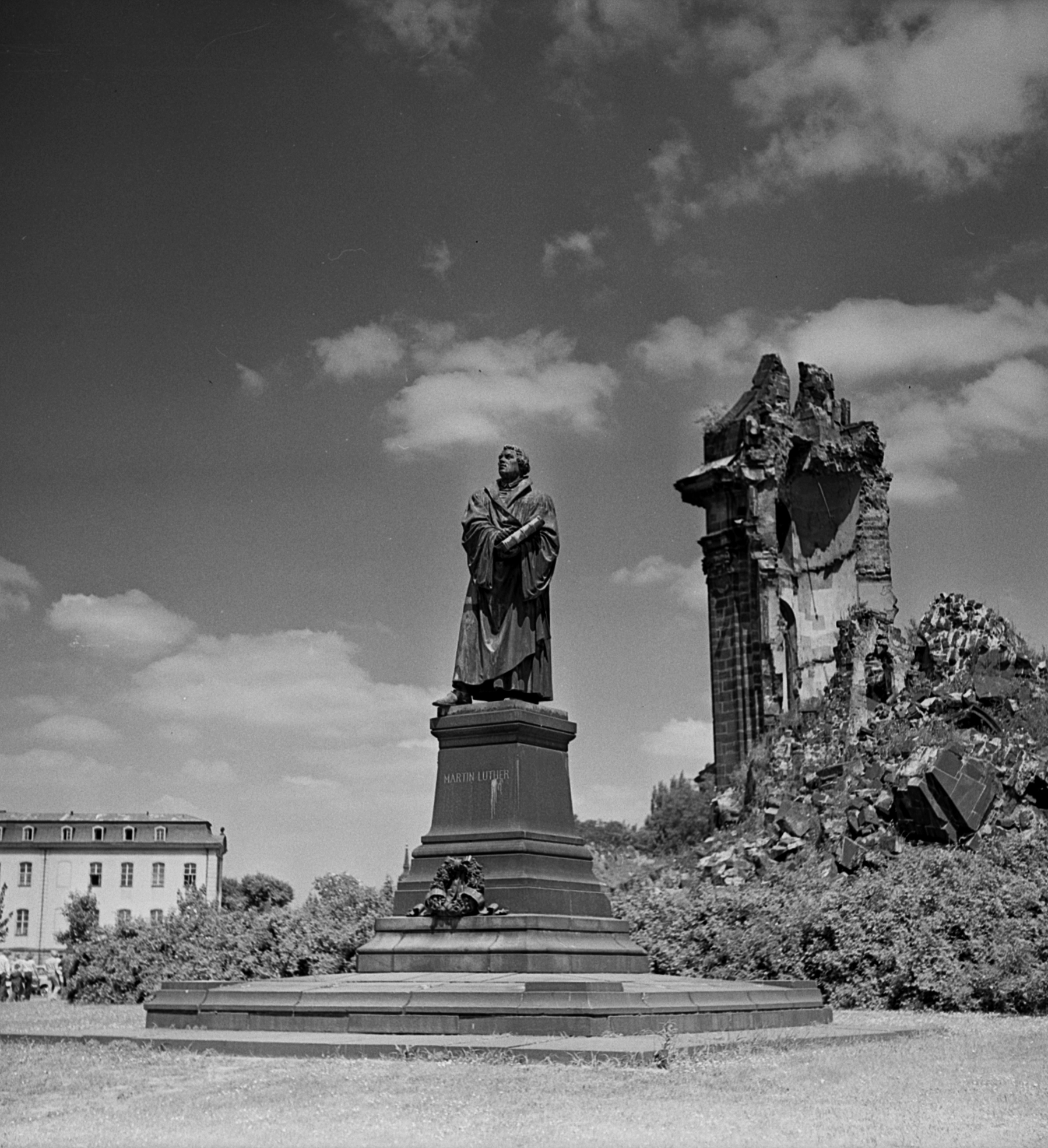 Das Martin-Luther-Denkmal vor der Ruine der Dresdner Frauenkirche wahrscheinlich in den 1970er Jahren